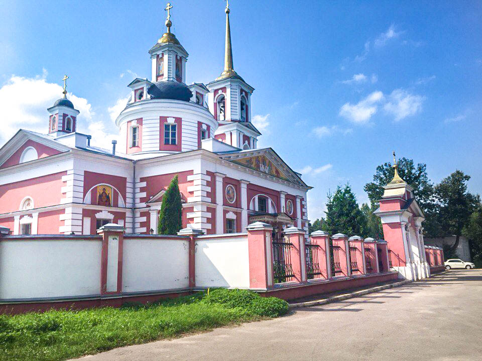 Усадьба «Алмазово»: Алмазово, Щёлковский район, Московская область